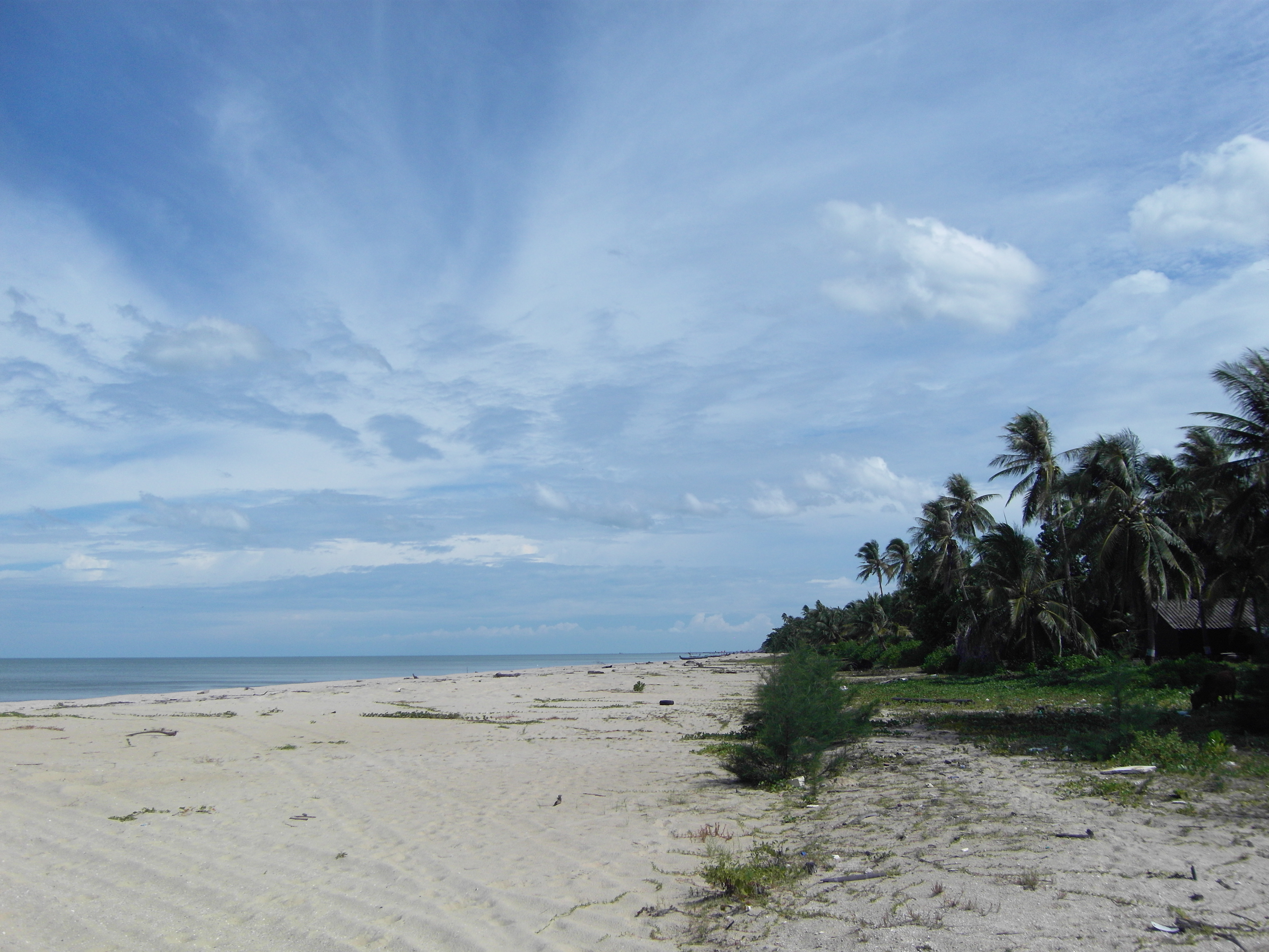 4151, Tambon Khanap Nak, Amphoe Pak Phanang, Chang Wat Nakhon Si Thammarat 80170, Thailand